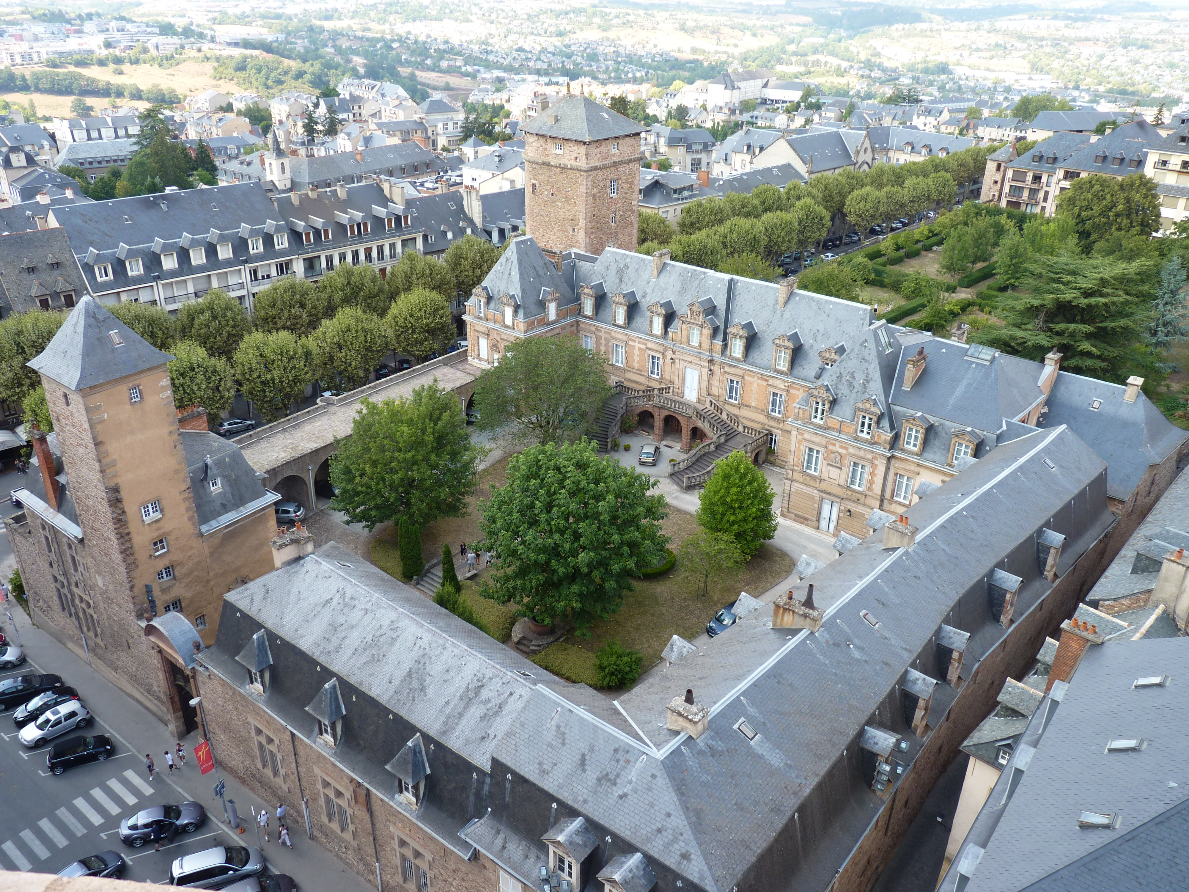 Ancien évêché de Rodez